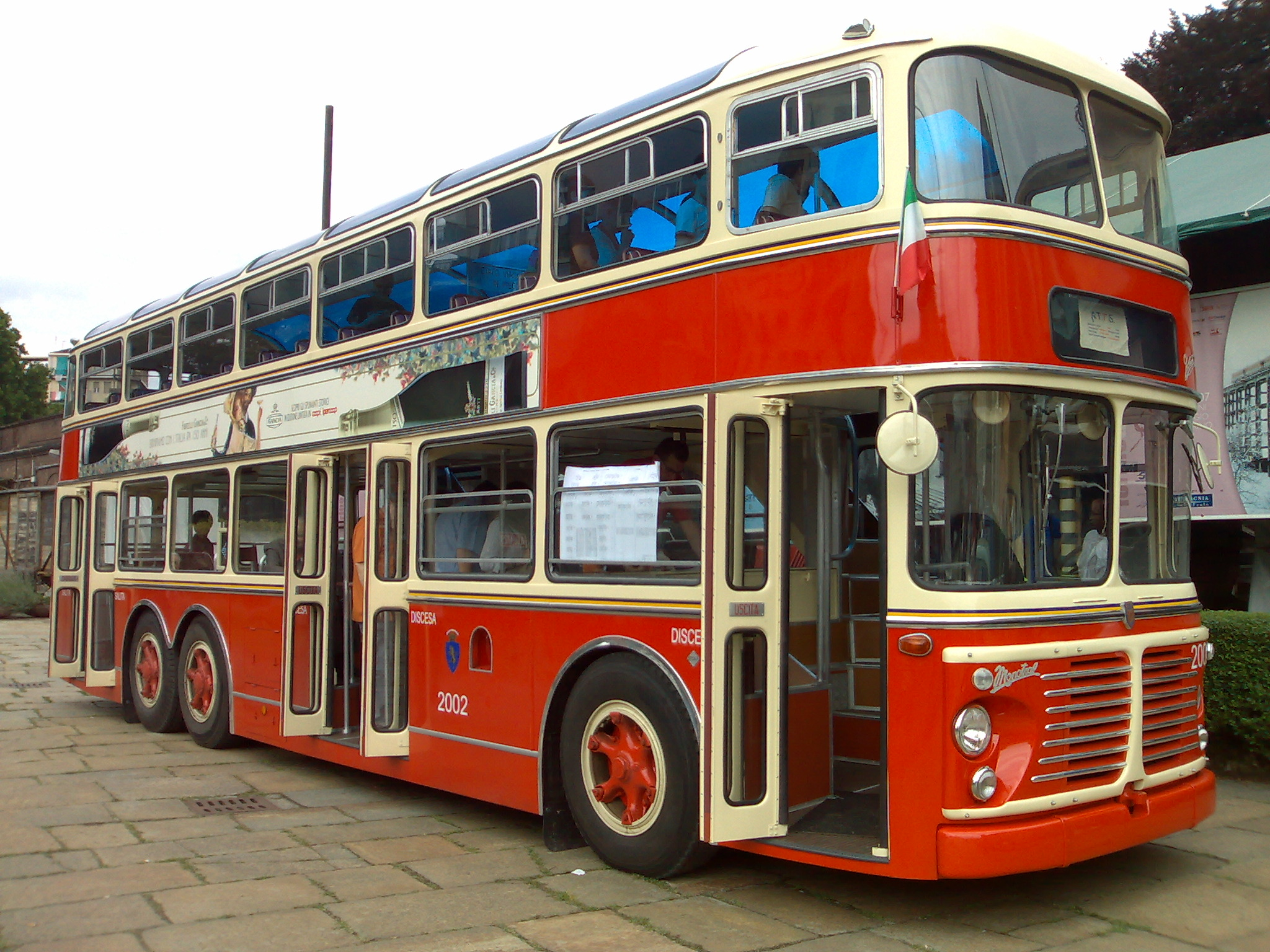 Autobus bipiano Fiat 413 Viberti Monotral CV 61 n. 2002